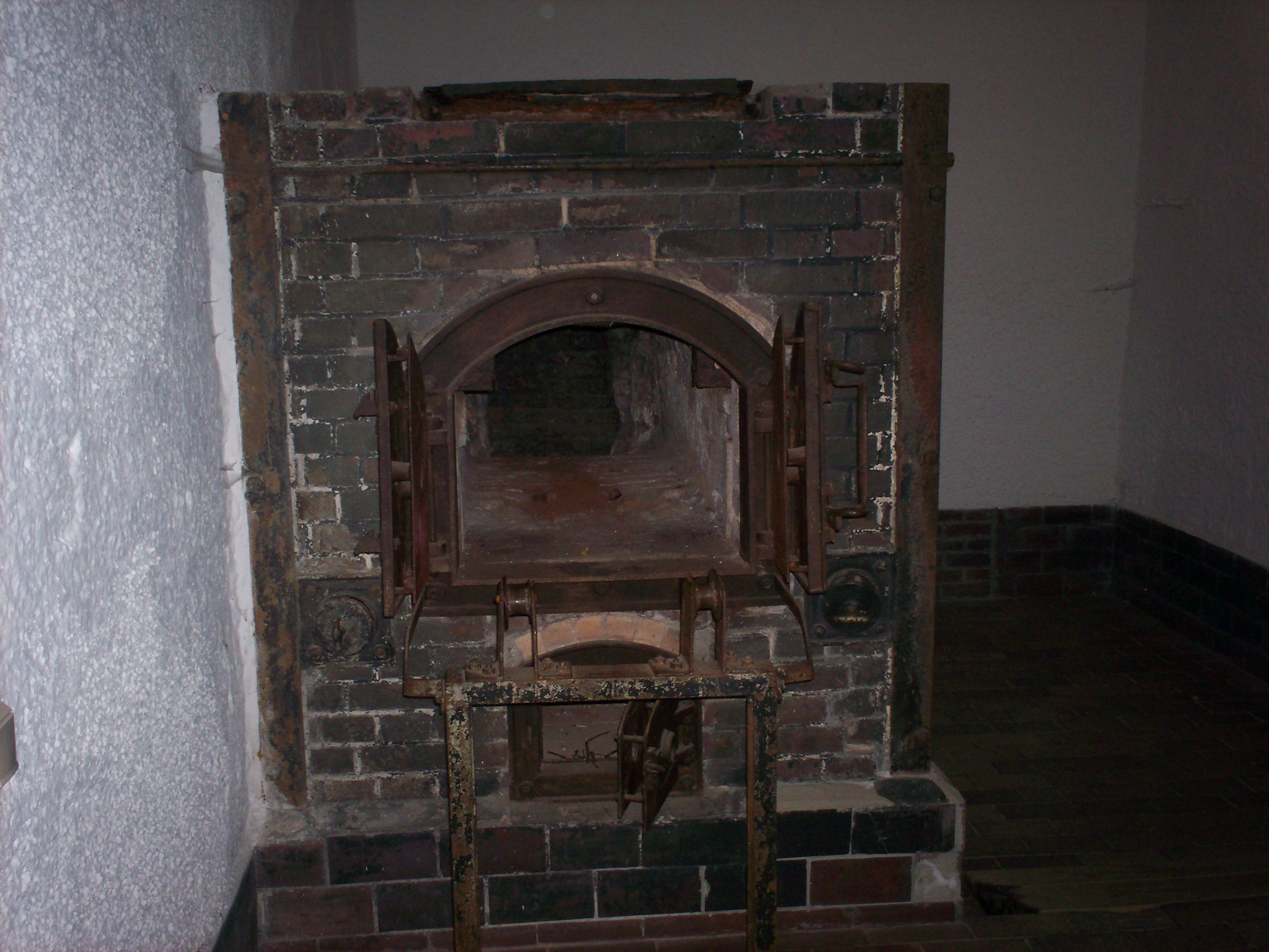 Krematorium im KZ Flossenbürg, 2008